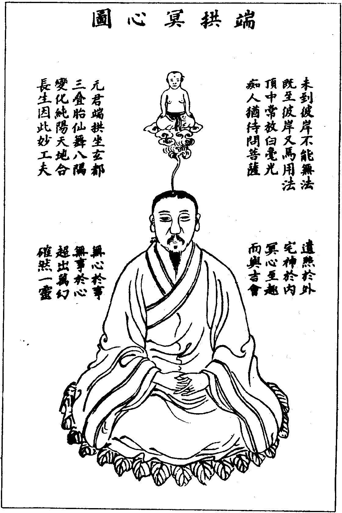 性命圭旨 端拱冥心圖